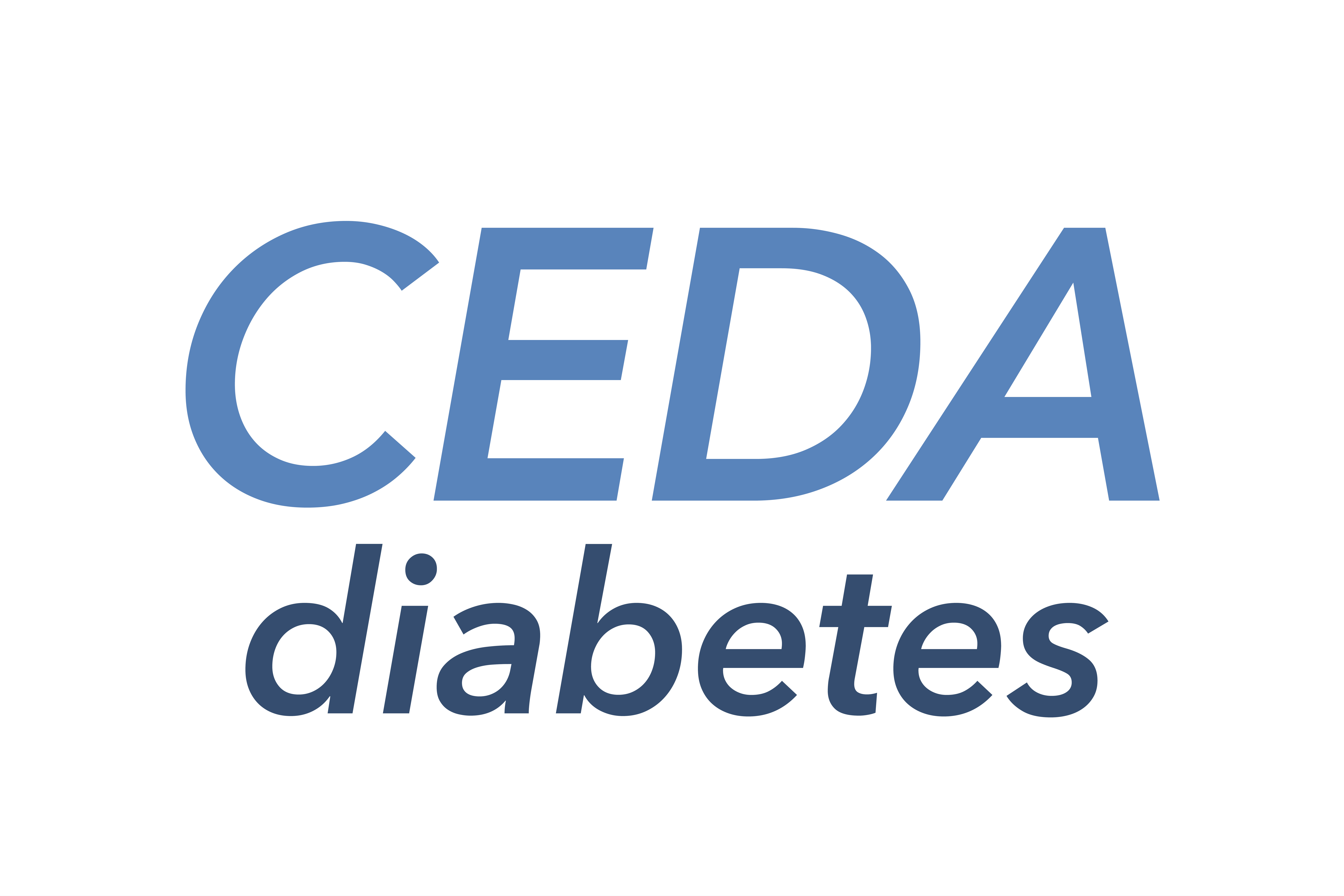 Logo der CEDA diabetes